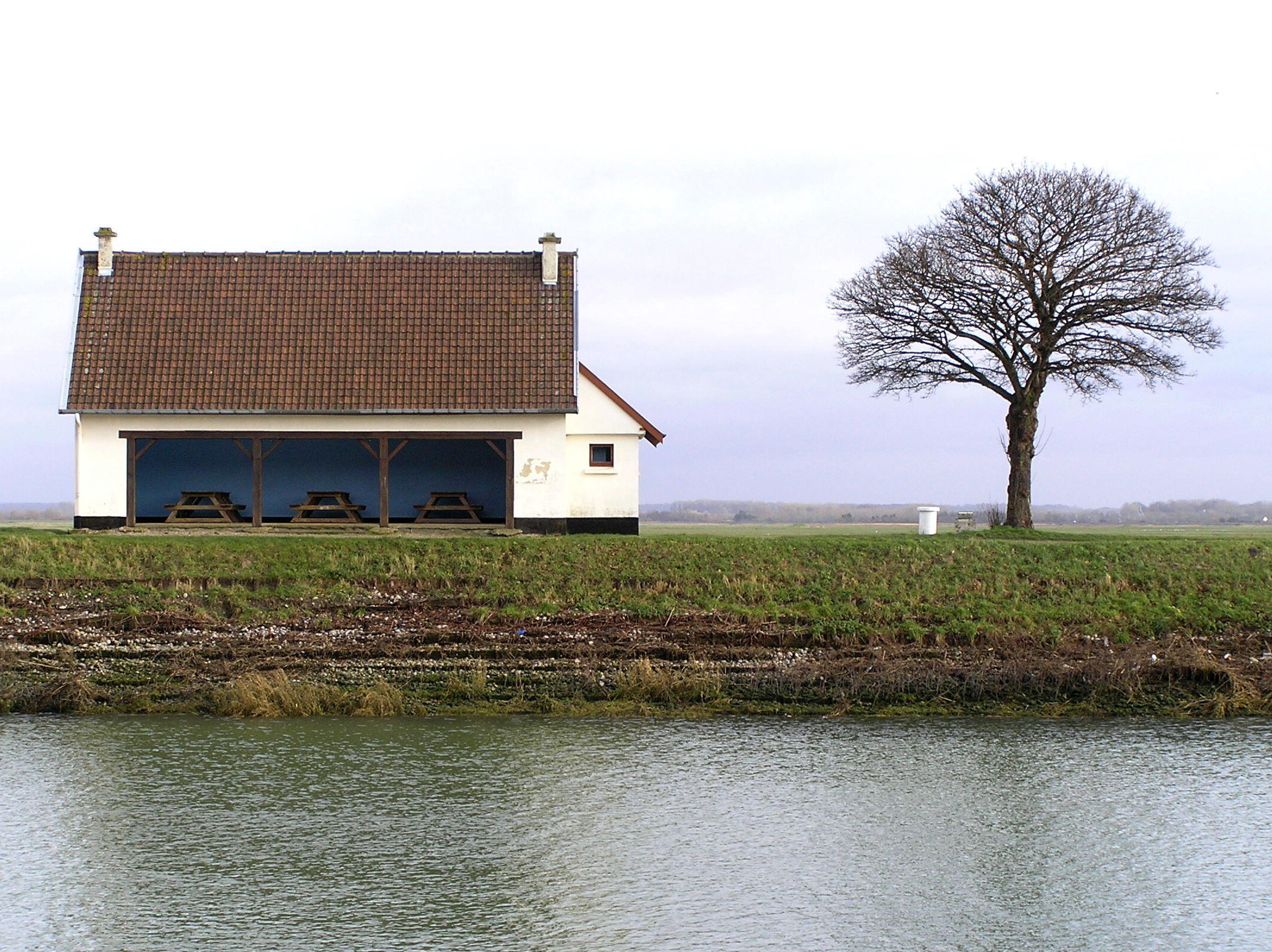 St-Valery-sur-Somme (Somme, France) Abri sur la jetée.Abri.